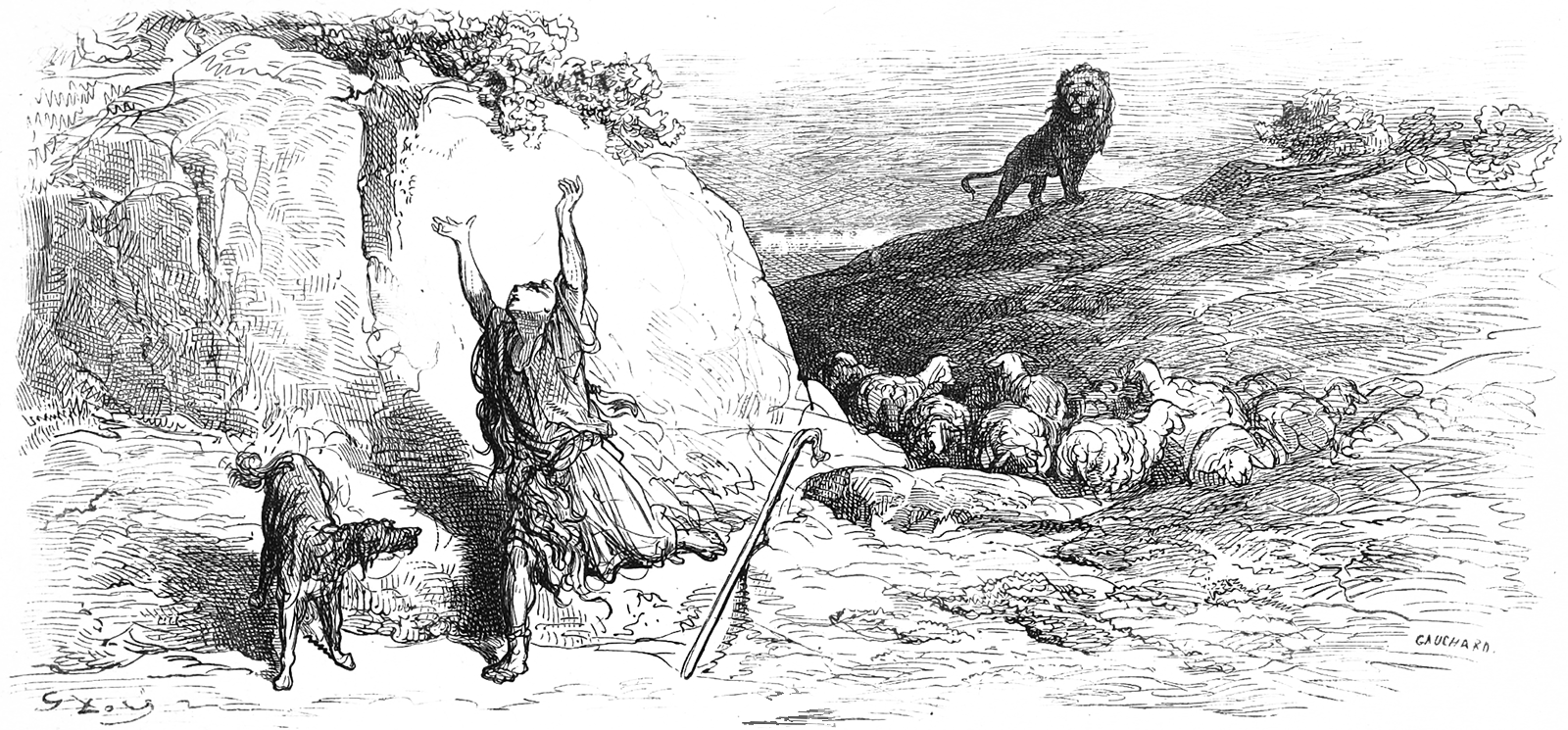 grafika z książki PL Bajki, Jean de La Fontaine, nakładem i drukiem Jana Noskowskiego, Warszawa 1876